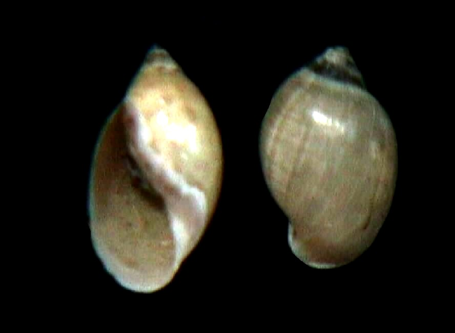 Aplexa rivalis (Maton & Rackett, 1807) colectada en 1986 en quebrada La Boyera municipio El Hatillo, estado Miranda - Venezuela